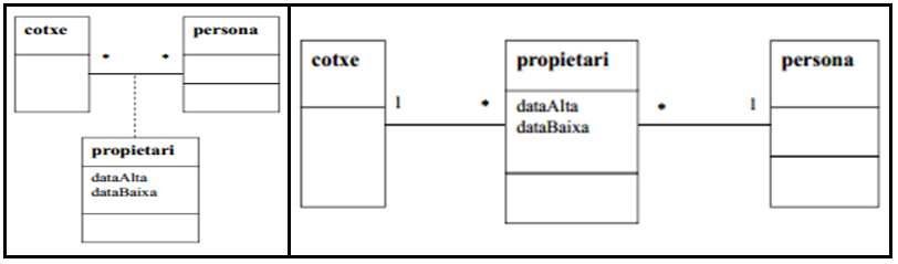 Exemple de Classe Associació UML